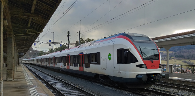 Rame Stadler Flirt en UM2 de la ligne S2 du RER Vaud, à Vallorbe